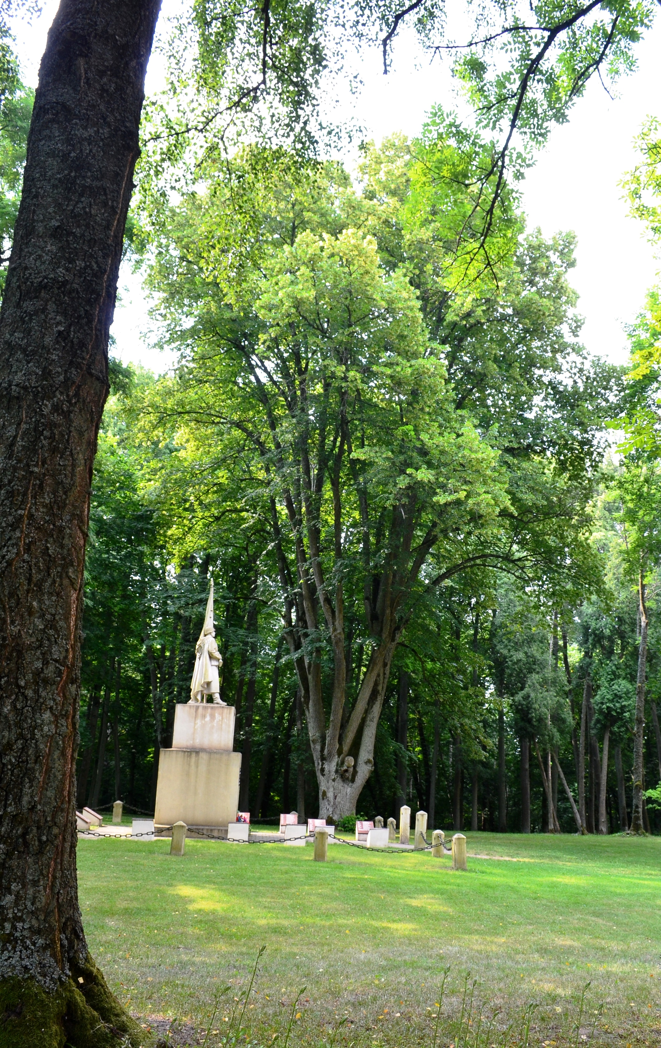 Raudonės septynkamienė liepa, Jurbarko raj.